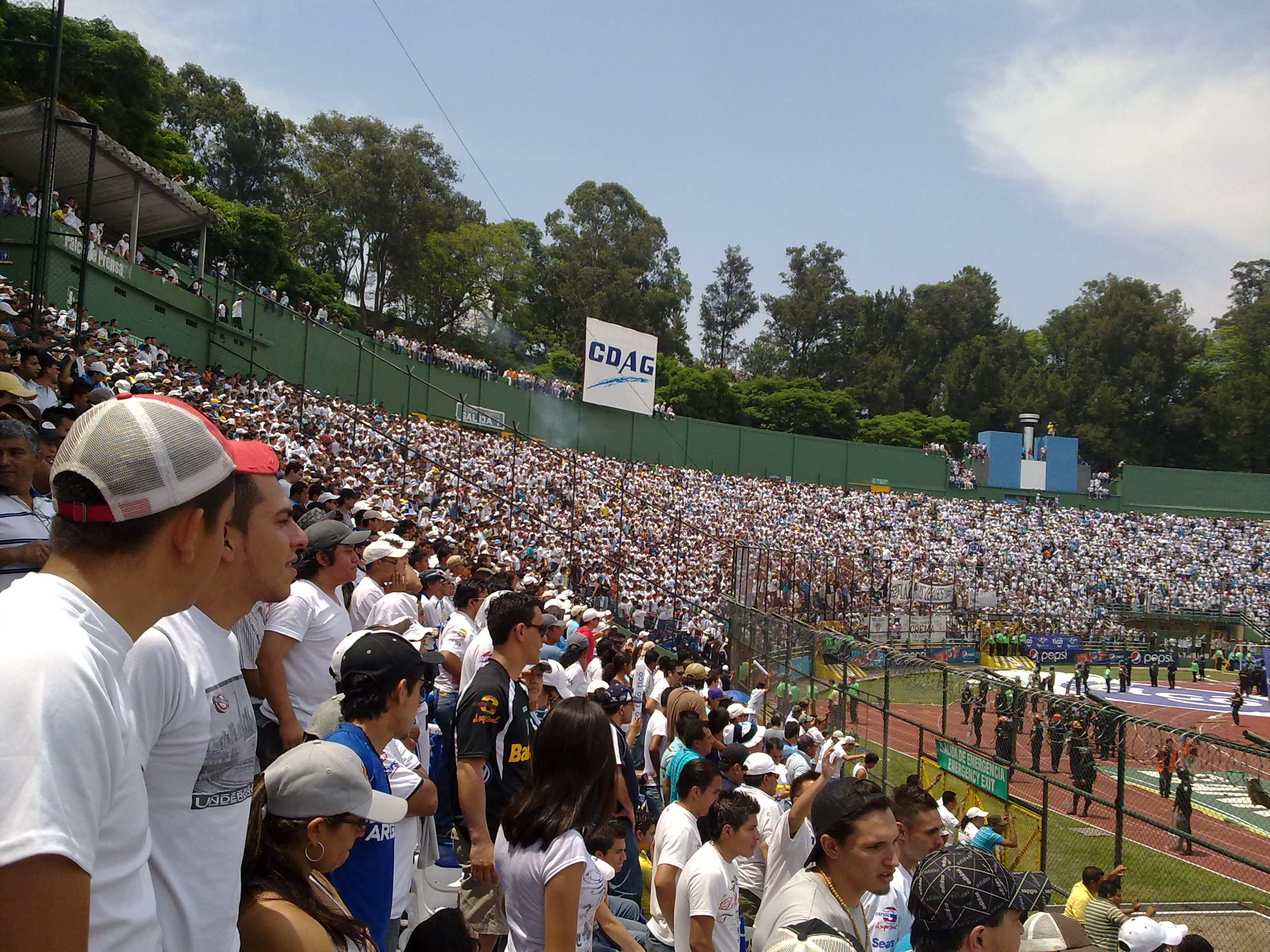 Final cremas rojos clausura 2011